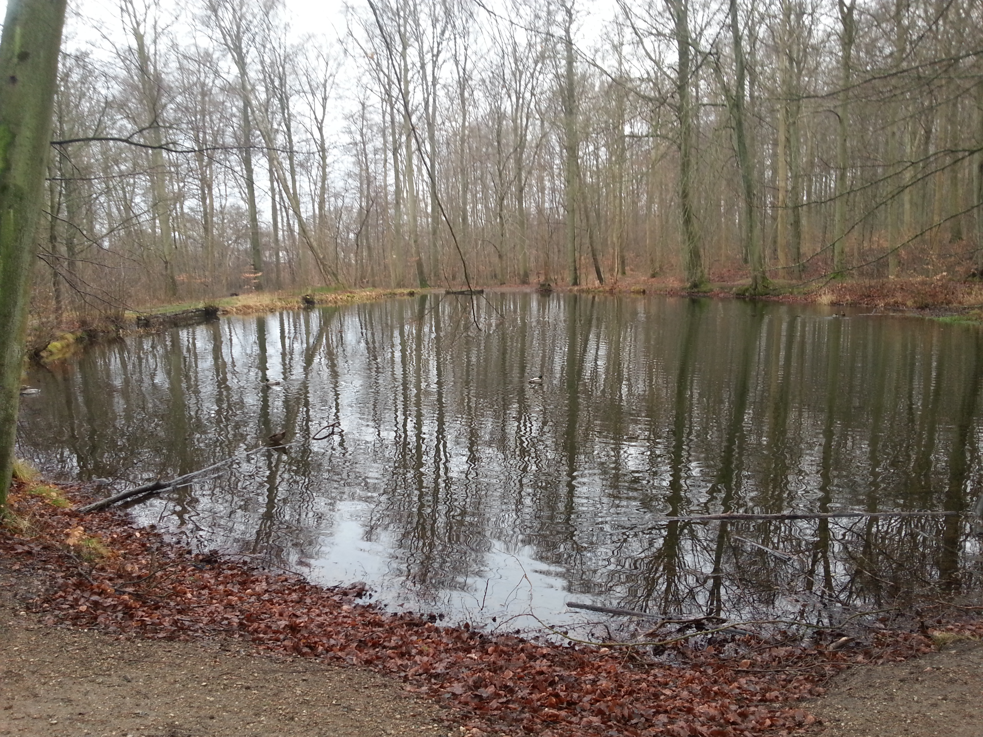 Gamle mølledamme i Egebæksvang